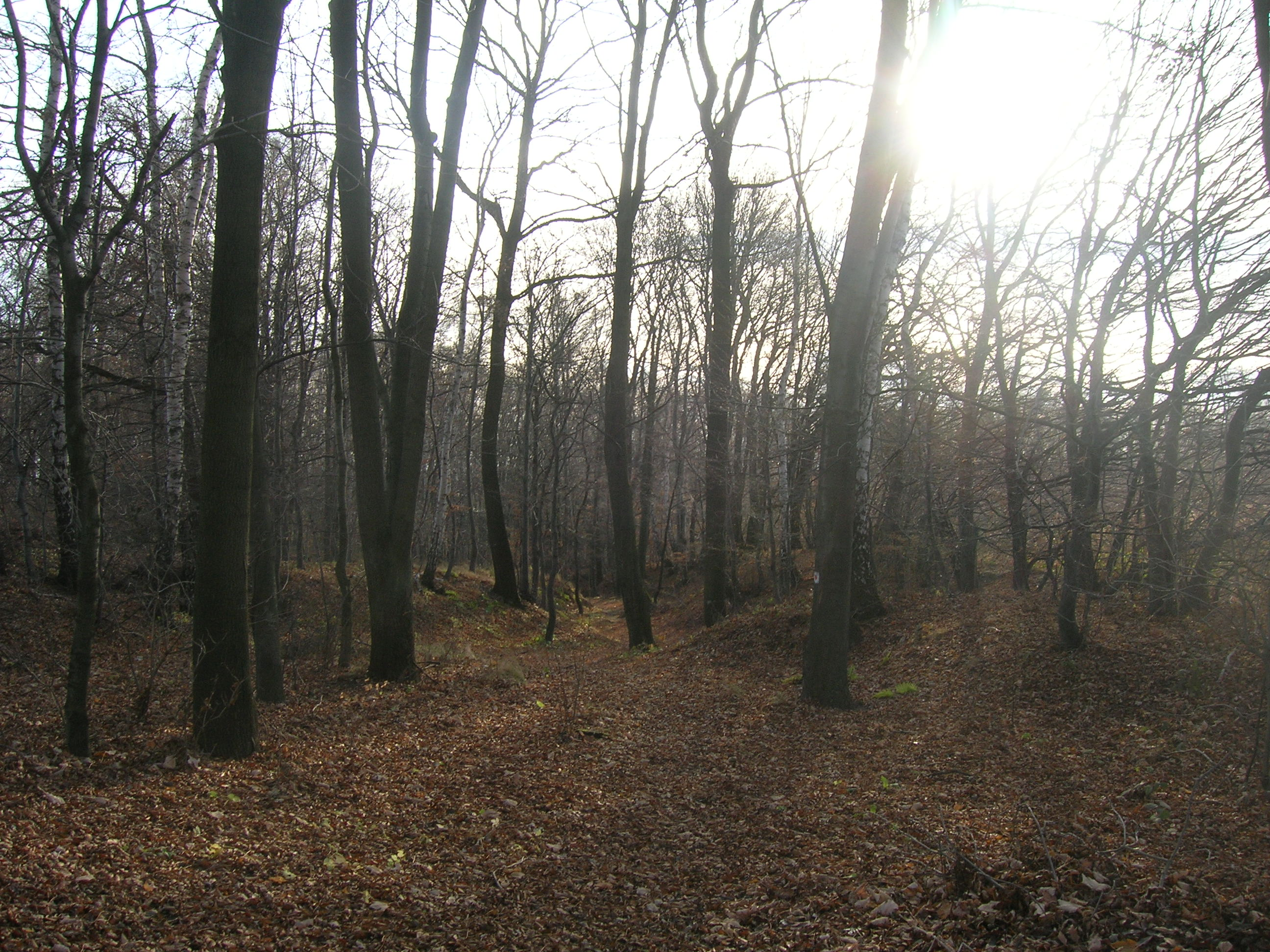 Jadybówki